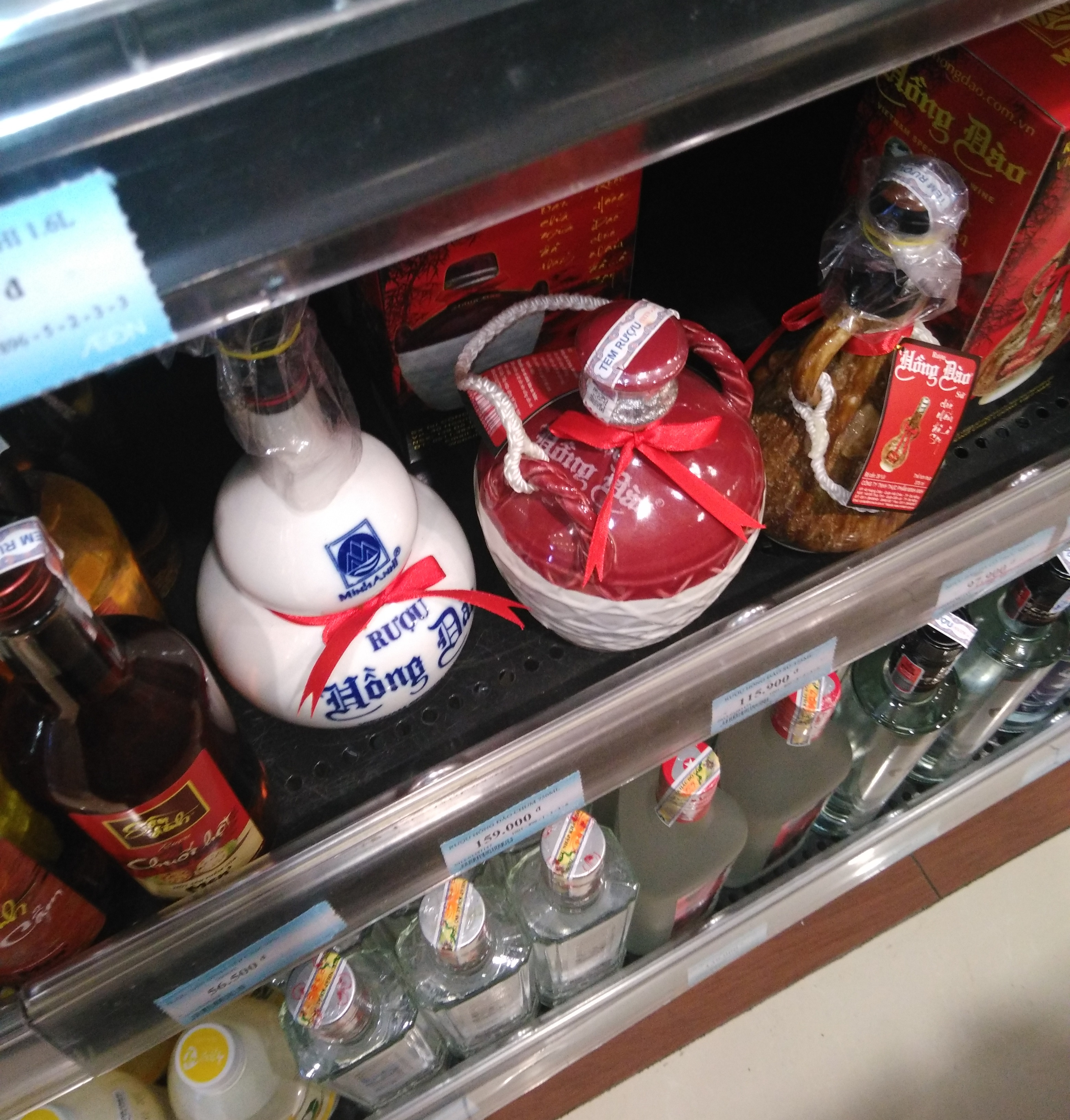 Cuisine of Vietnam